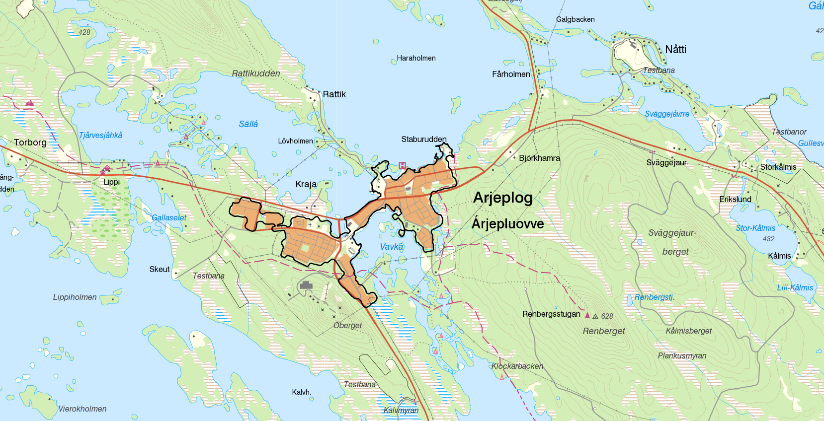 Tätorten Arjeplog med gränserna från Statistiska centralbyråns tätortsavgränsning 2015 i svart. Bakgrundskarta från Lantmäteriet, skala 1:30 236.